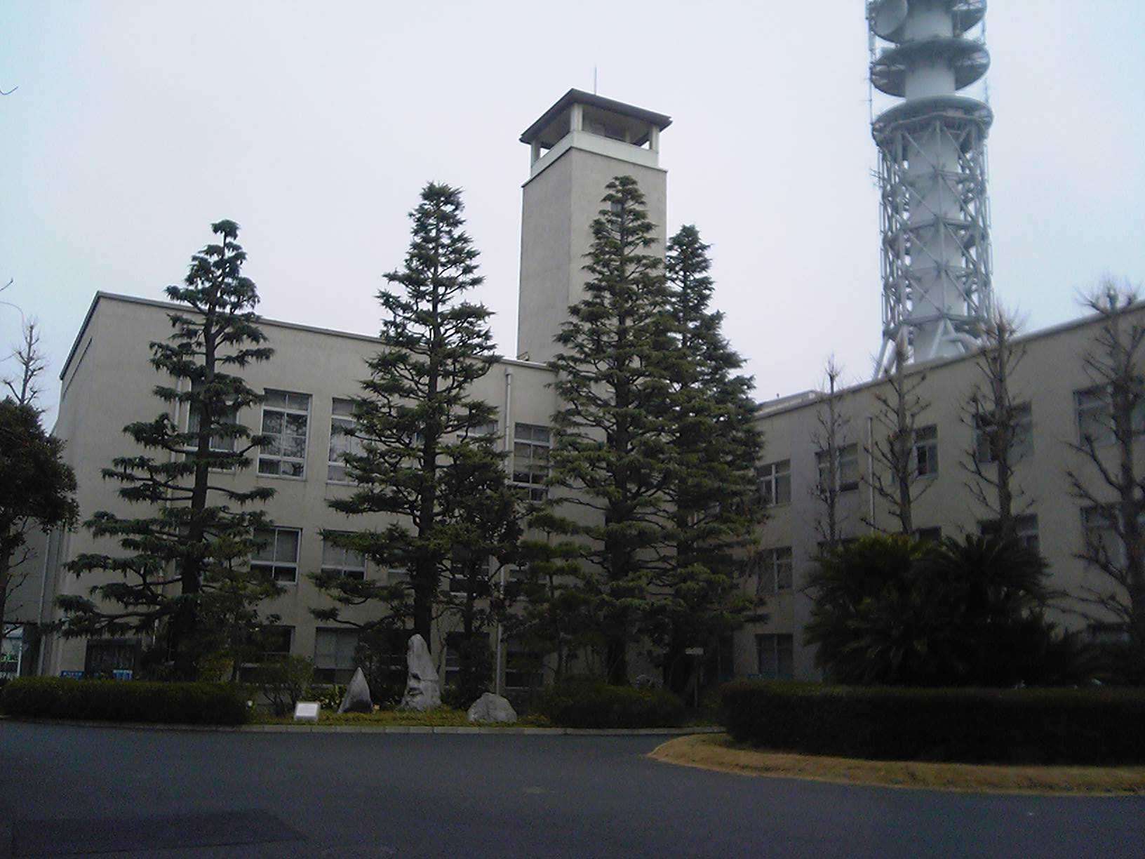 Fujisawa City Hall in Kanagawa Prefecture, Japan